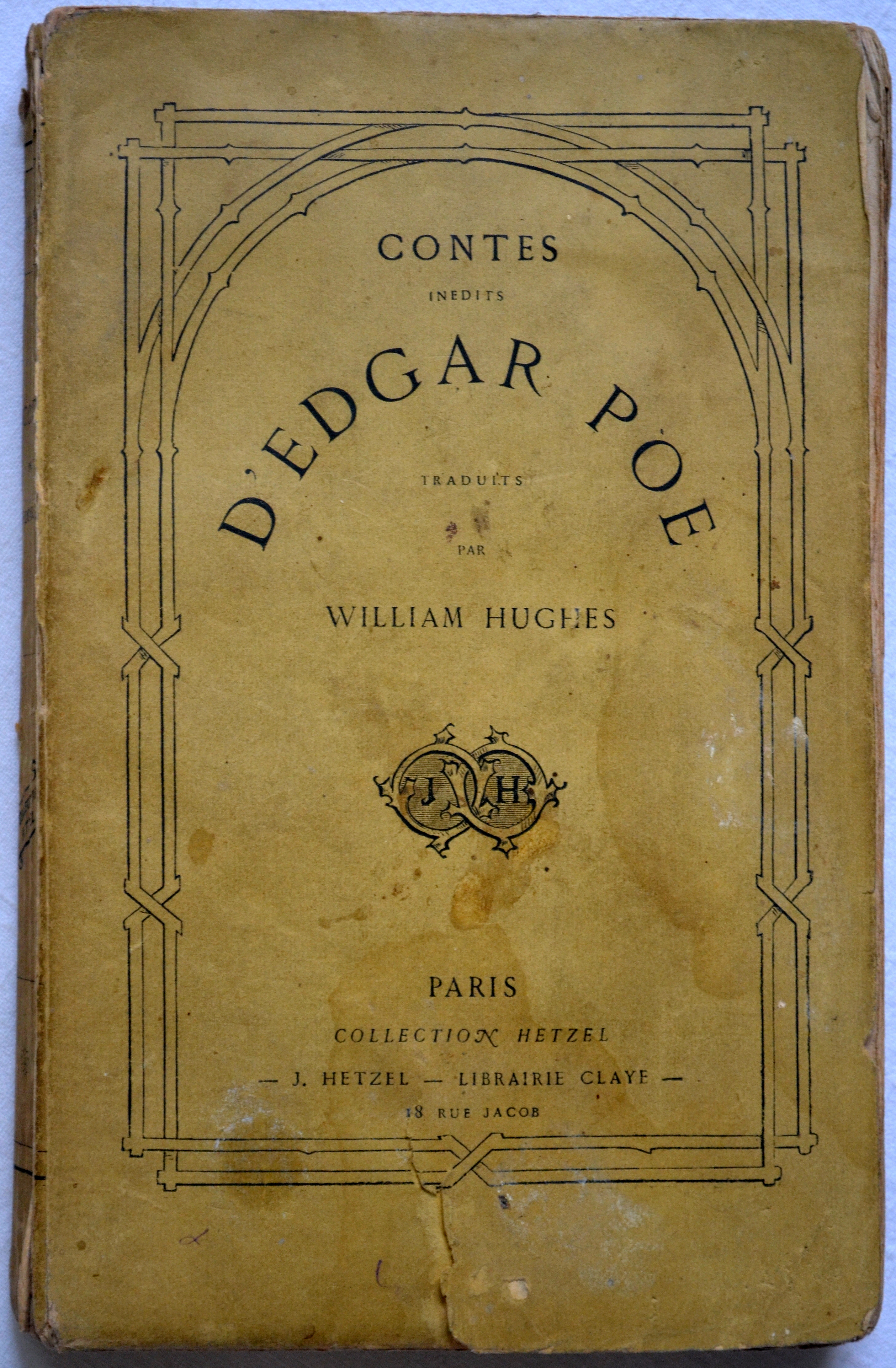 Edgar Allan Poe, Übersetzung von William Little Hughes: Les Contes inédits d’Egard Poe, Hetzel Verlag, Paris 1862 (Erstausgabe, édtion originale, first edition).